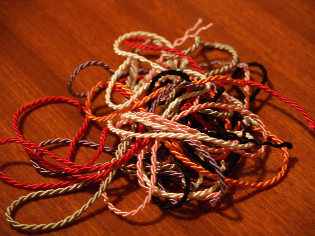 San Blas kordoiak.